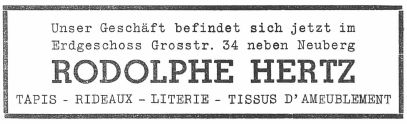 Publicité Rodolphe Hertz du 5 mai 1949, parue au Luxemburger Wort.